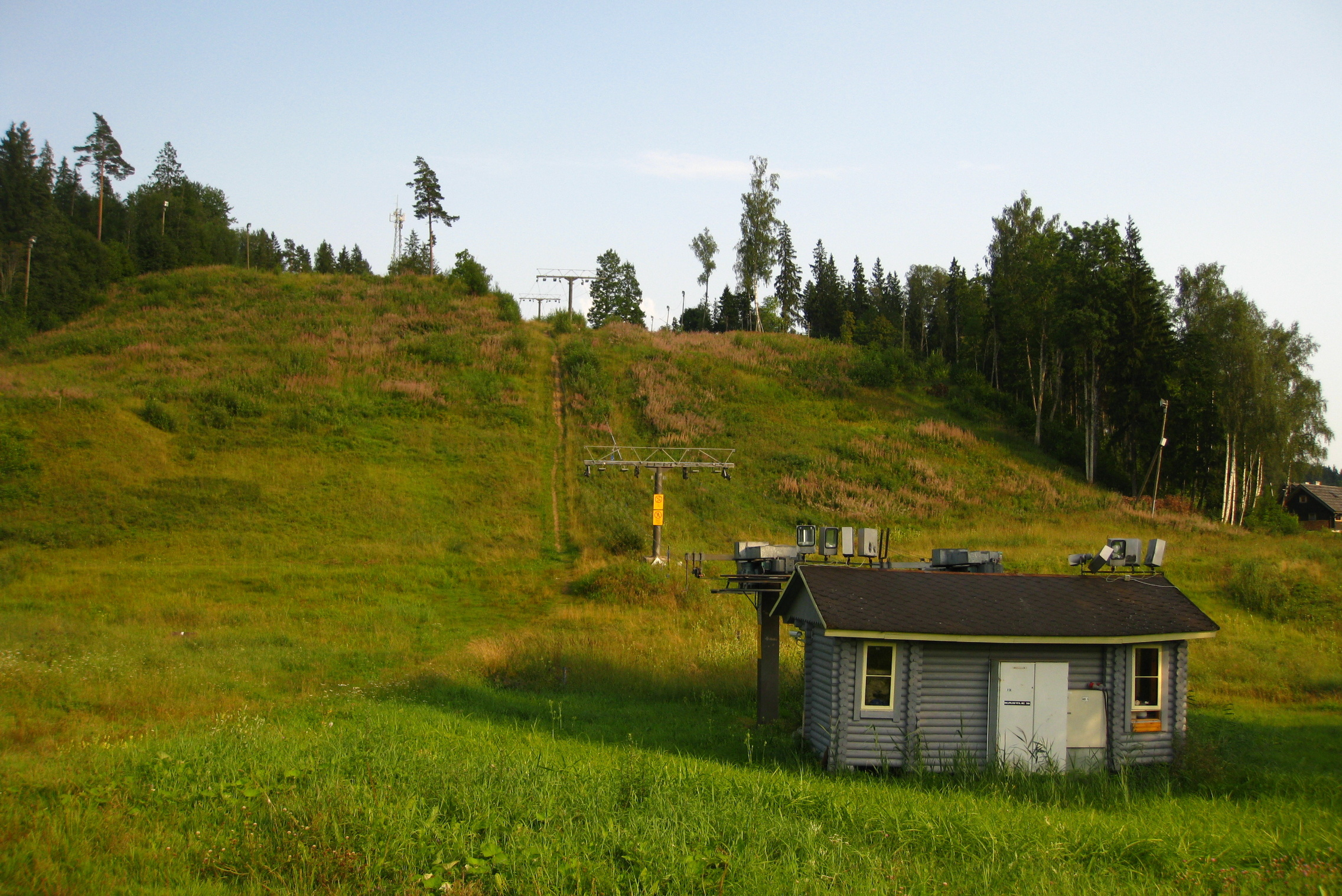 Väikse Munamäe läänenõlv, Otepää looduspark